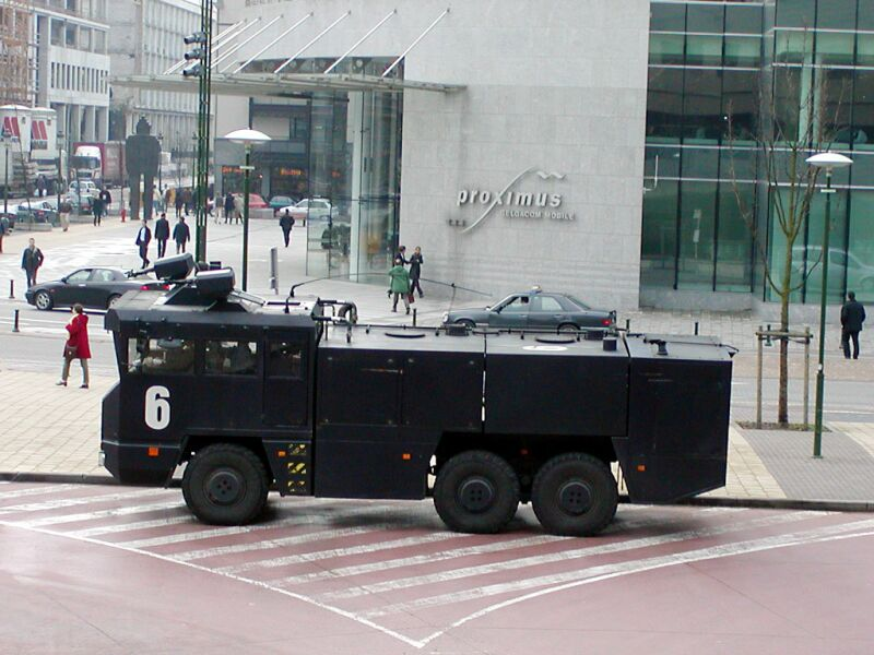 MOL waterkanon van de Federale Politie in Brussel. Eigen foto.